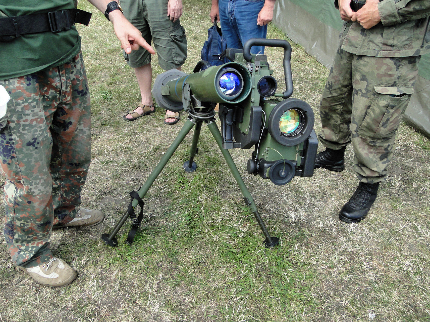 wyrzutnia pocisków kierowanych "Spike"